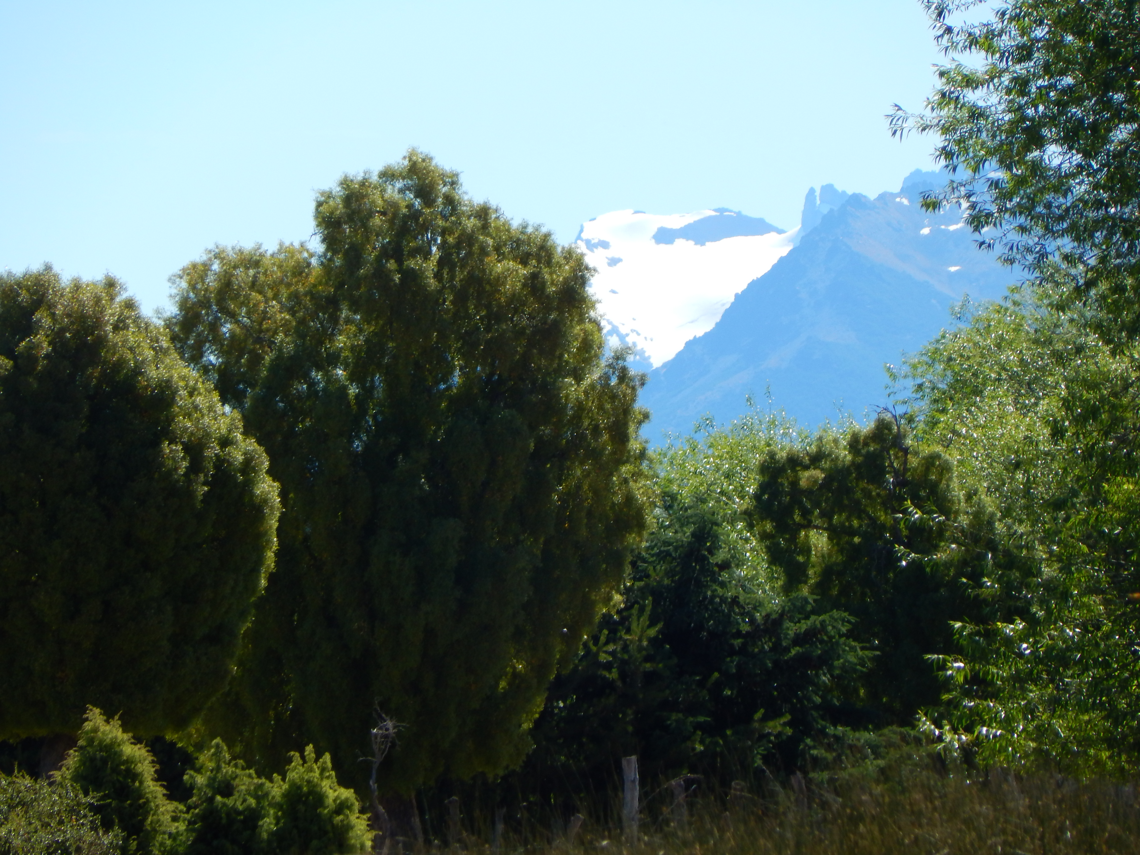 Bosques andino patagonicos